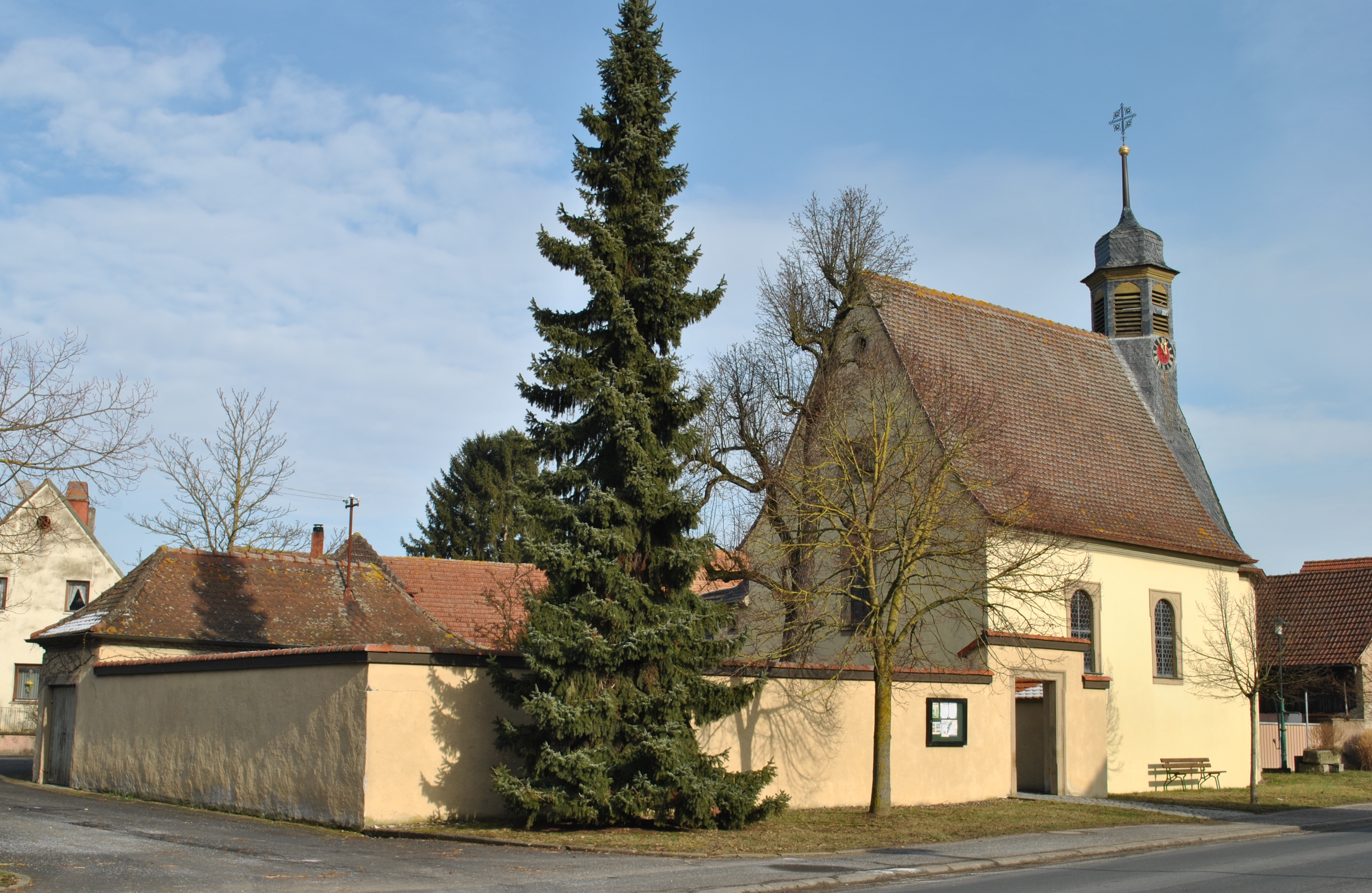 Katholische Filialkirche St. Michael Saalbau mit eingezogenem polygonalem Chor und Dachreiter, erbaut 1688, Anbauten 1779/1780; mit Ausstattung D-6-75-165-5